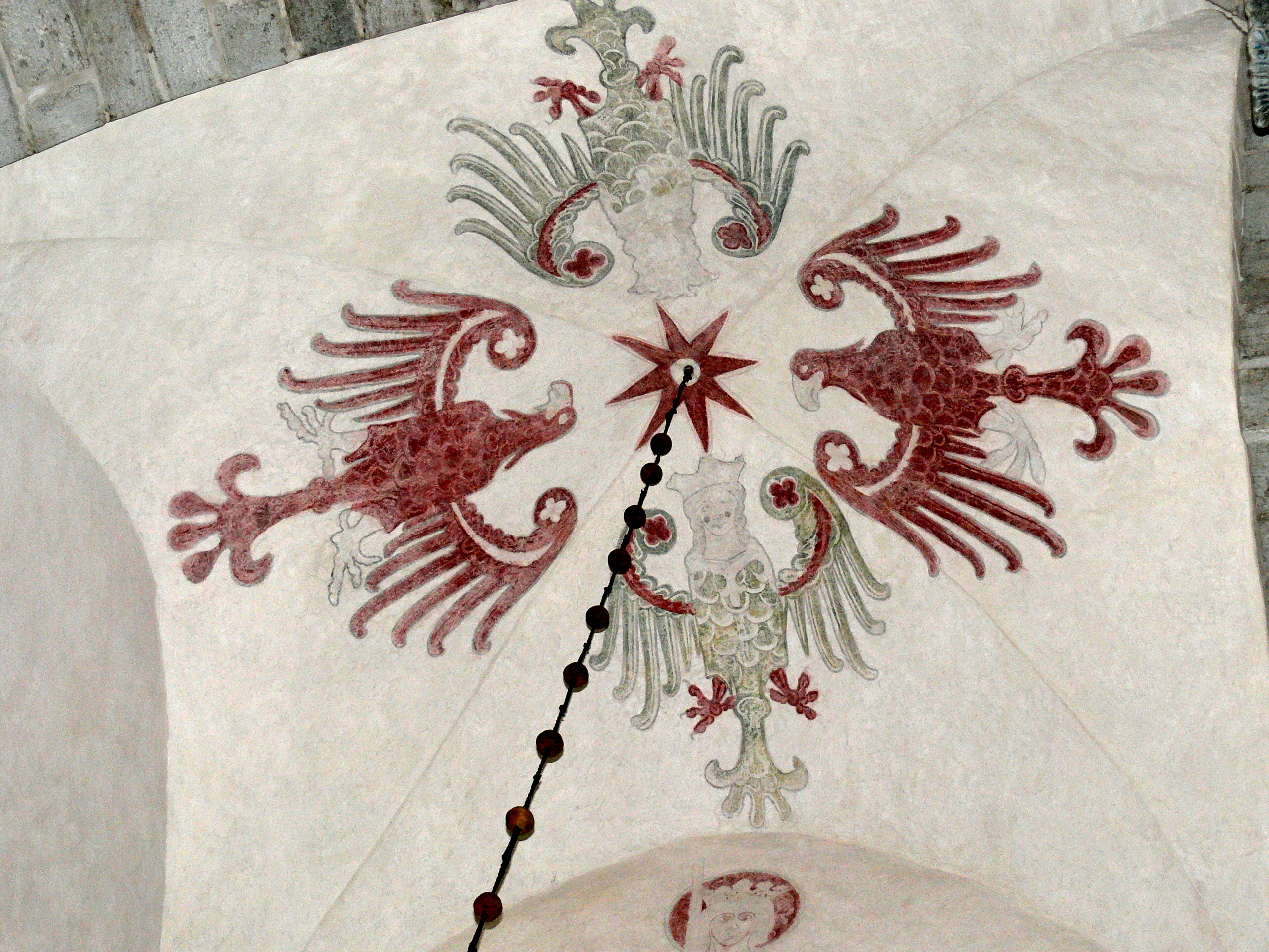 Gothem kyrka auf Gotland. Gotische Deckenmalerei mit Adlern